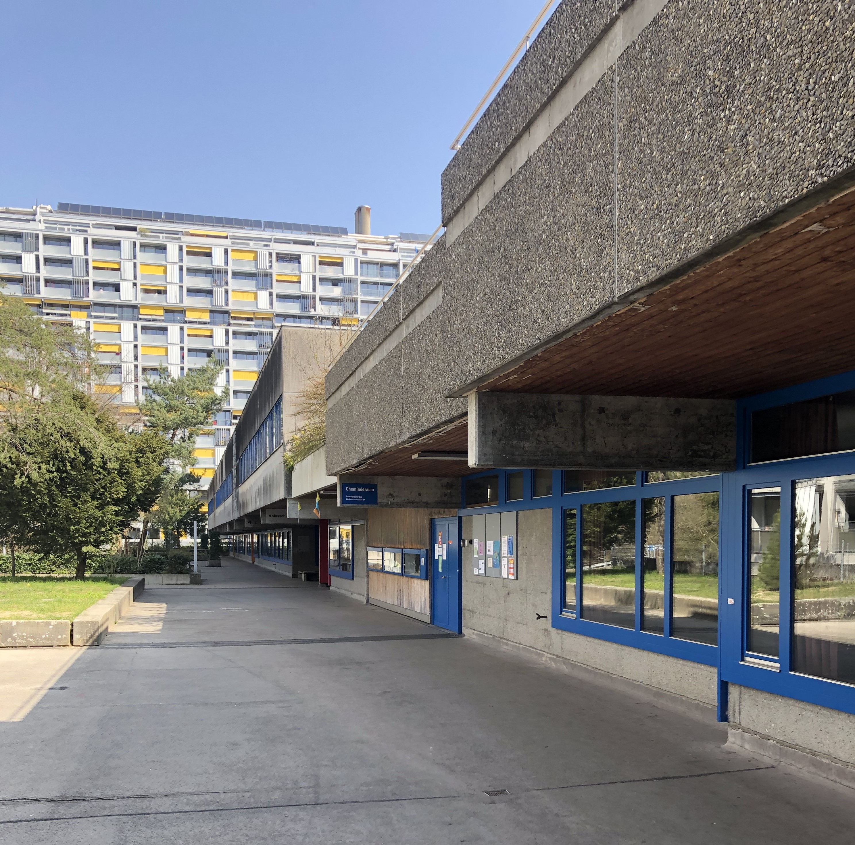 Gaebelbach Zentrumspassage Erdgeschoss